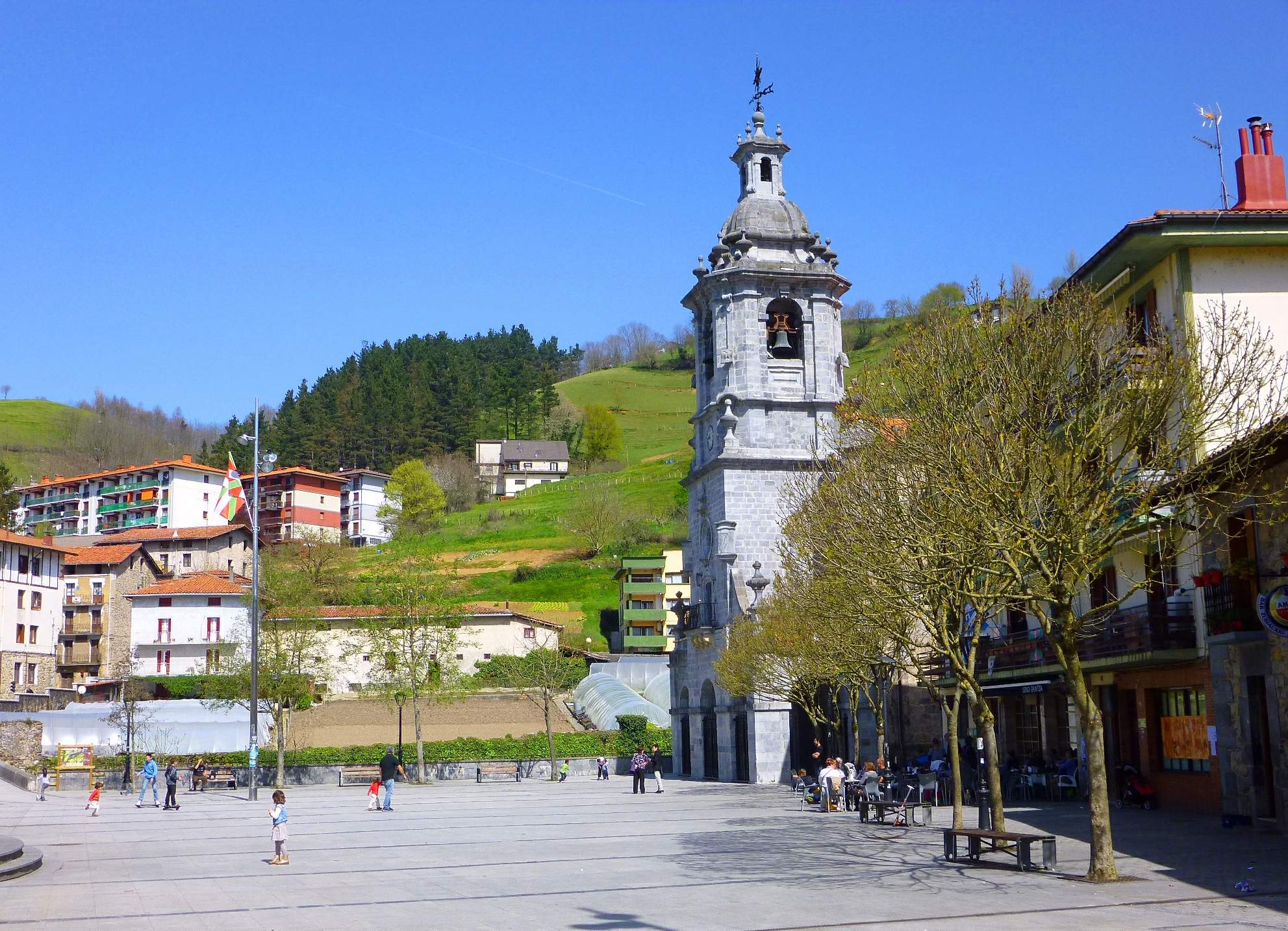 Ibarra (Gipúzcoa)